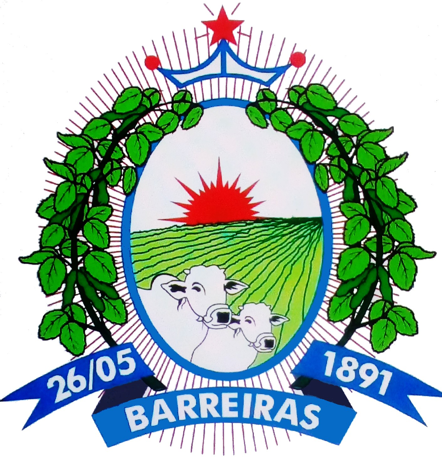 Brasão feito em photoshop